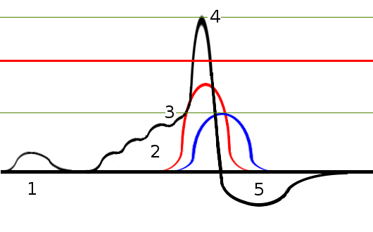 Zmiany potencjału wewnętrznej strony błony neuronu; 1-pojedynczy bodziec podprogowy, 2-seria sumujących się bodźców podprogowych osiągająca potencjał progowy(3), co skutkuje otwarciem napięciowo zależnych kanałów sodowych i osiągnięciem potencjału czynnościowego(4), 5-potencjał hiperpolaryzacyjny. Czarna prosta to normalny potencjał wewnętrznej strony błony, czerwona - potencjał strony zewnętrznej, przyjmowanej jako potencjał zerowy. Krzywe dzwonowe symbolizują ilość otwartych, napięciowo zależnych kanałów sodowych (czerwona) i potasowych (niebieska)